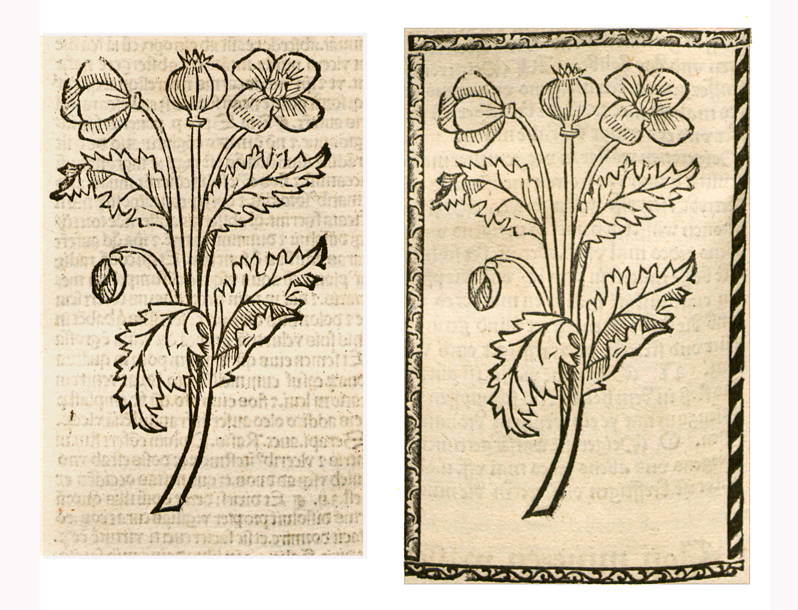 Abbildung von: Magsat Krut (Papaver somniferum